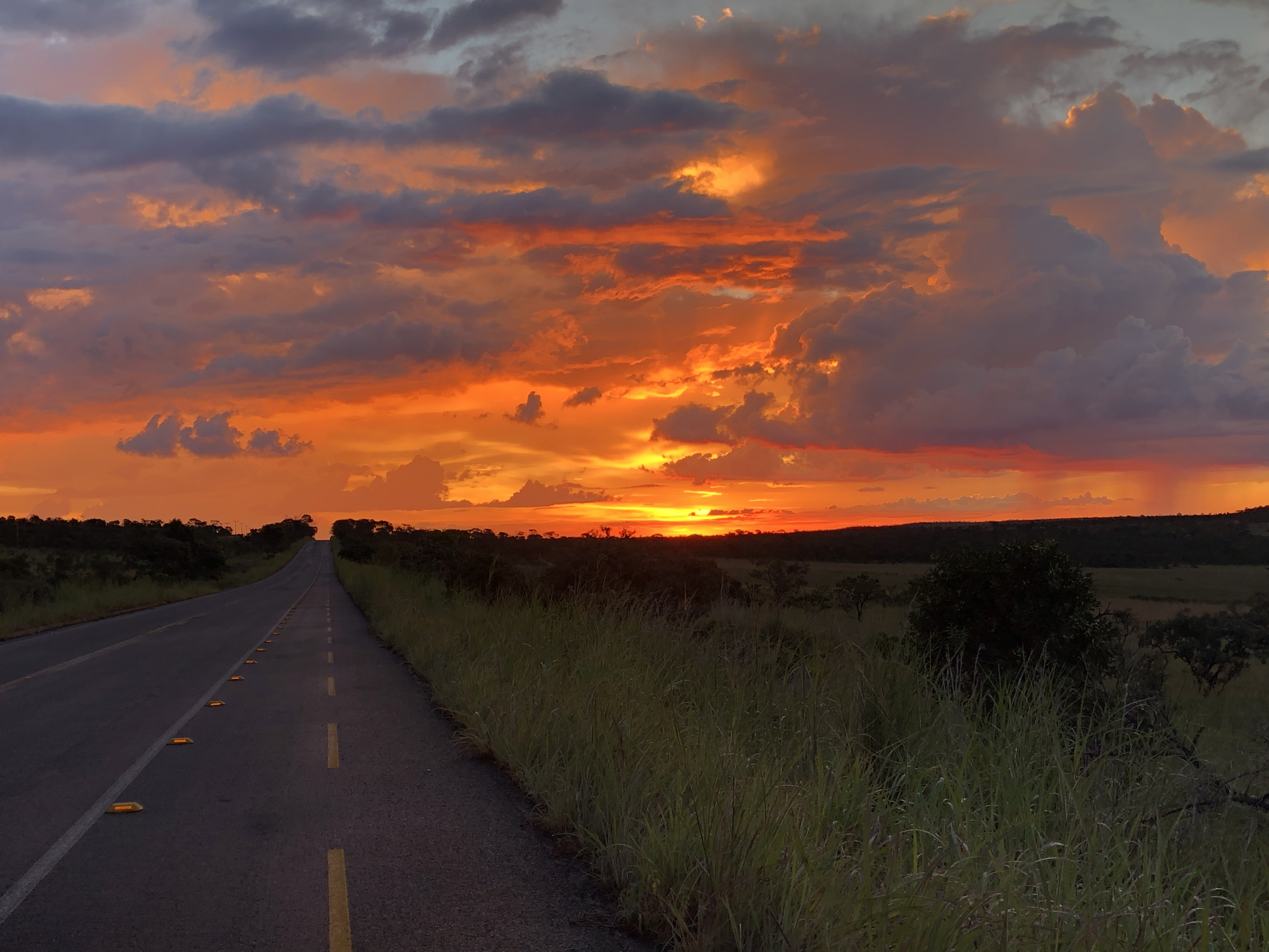 Essa estrada também é acesso para todos os atrativos disponíveis para visitação na região.